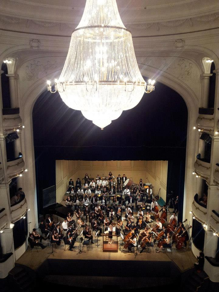 Vista superior del interior del Teatro San Martín de Tucumán